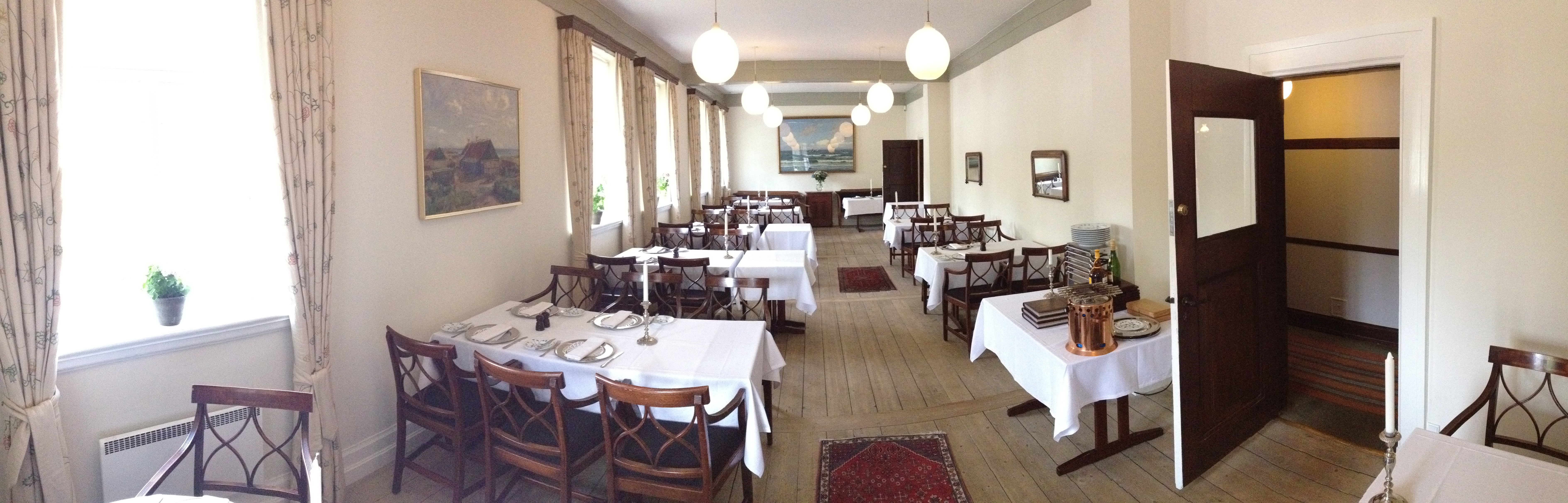 Matsal på Brøndums hotell i Skagen, Danmark.